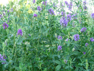 AZUCENA